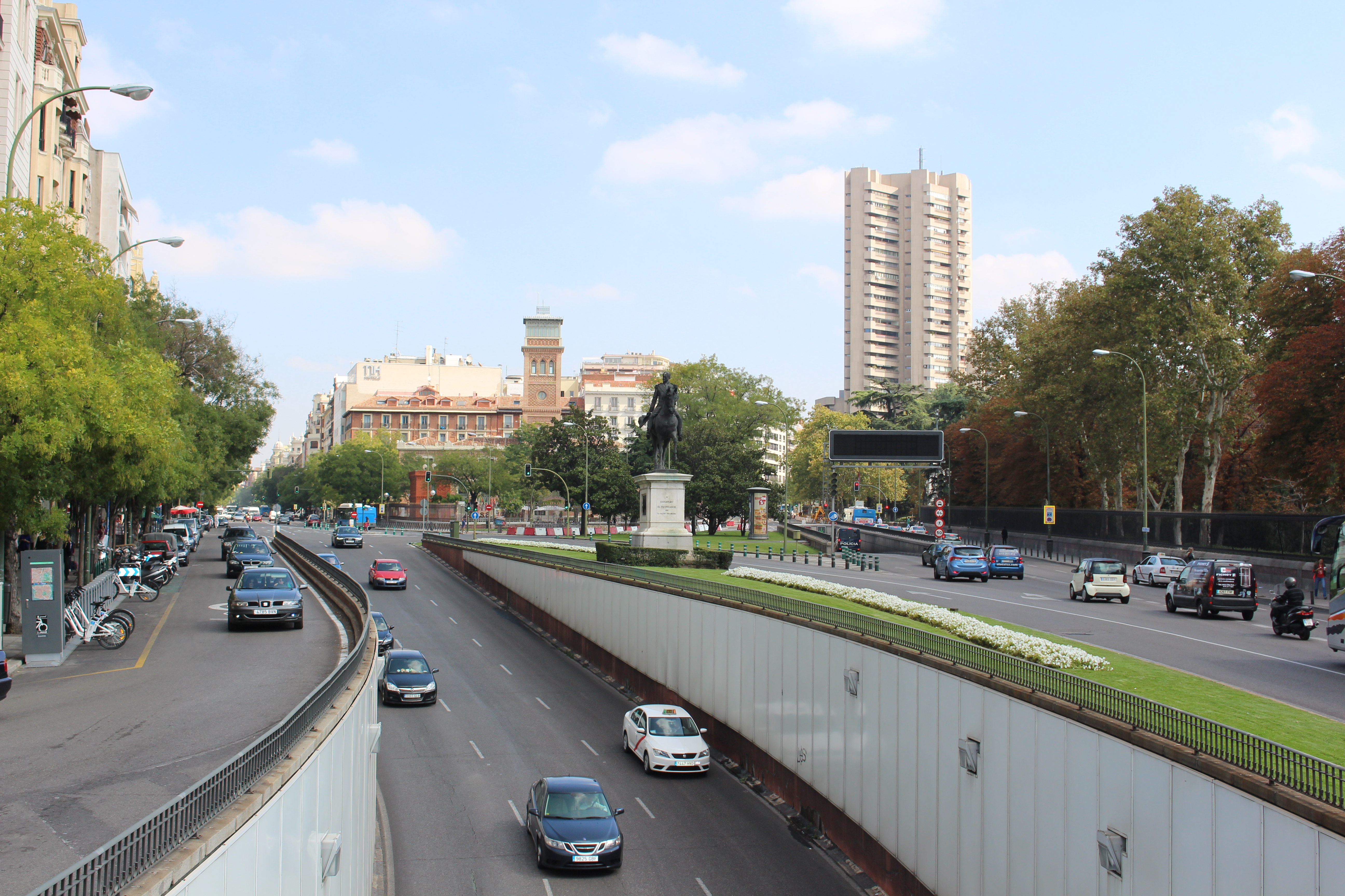 Мадрид. Памятник Бальдомеро Эспартеро (Joaquin Baldomero Fernandes Alvares Espartero) на ул. Алькала (Calle de Alcala)